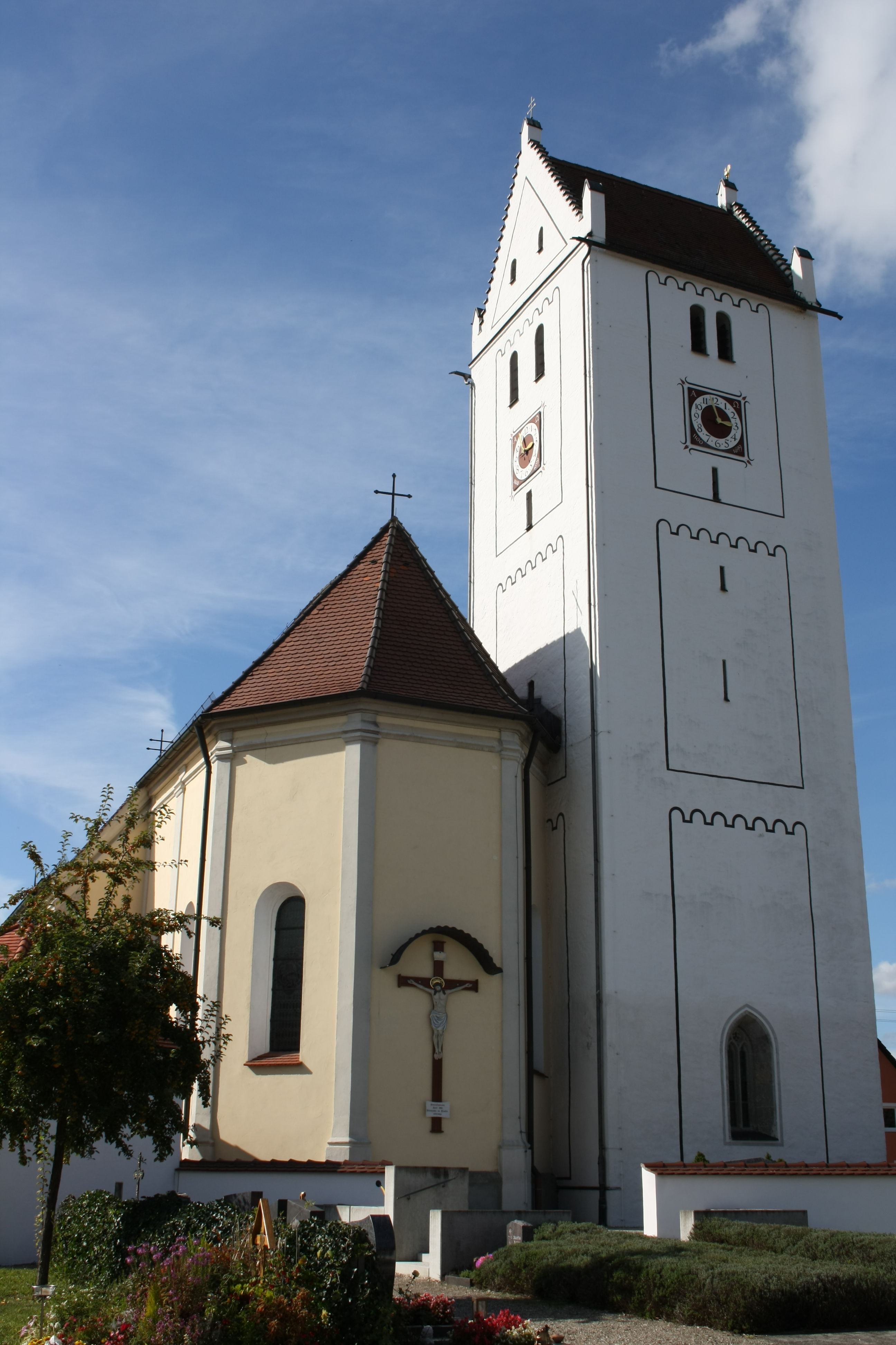 Katholische Pfarrkirche St. Martin in Mörslingen im Landkreis Dillingen an der Donau, Chor und frühgotischer Turm